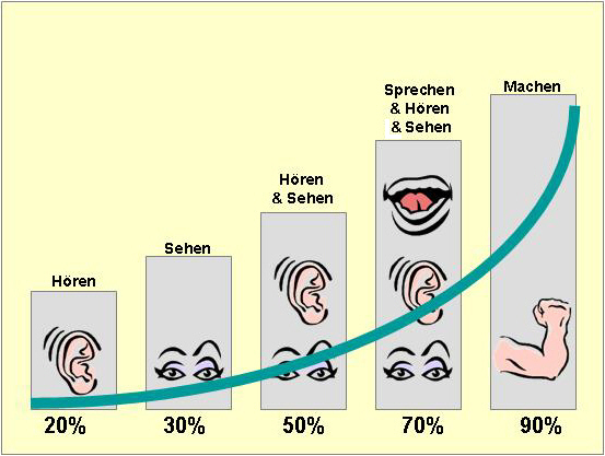 Naive Summentheorie / Beschreibung: Scheinbarer Lernzuwachs zur Medienkombination